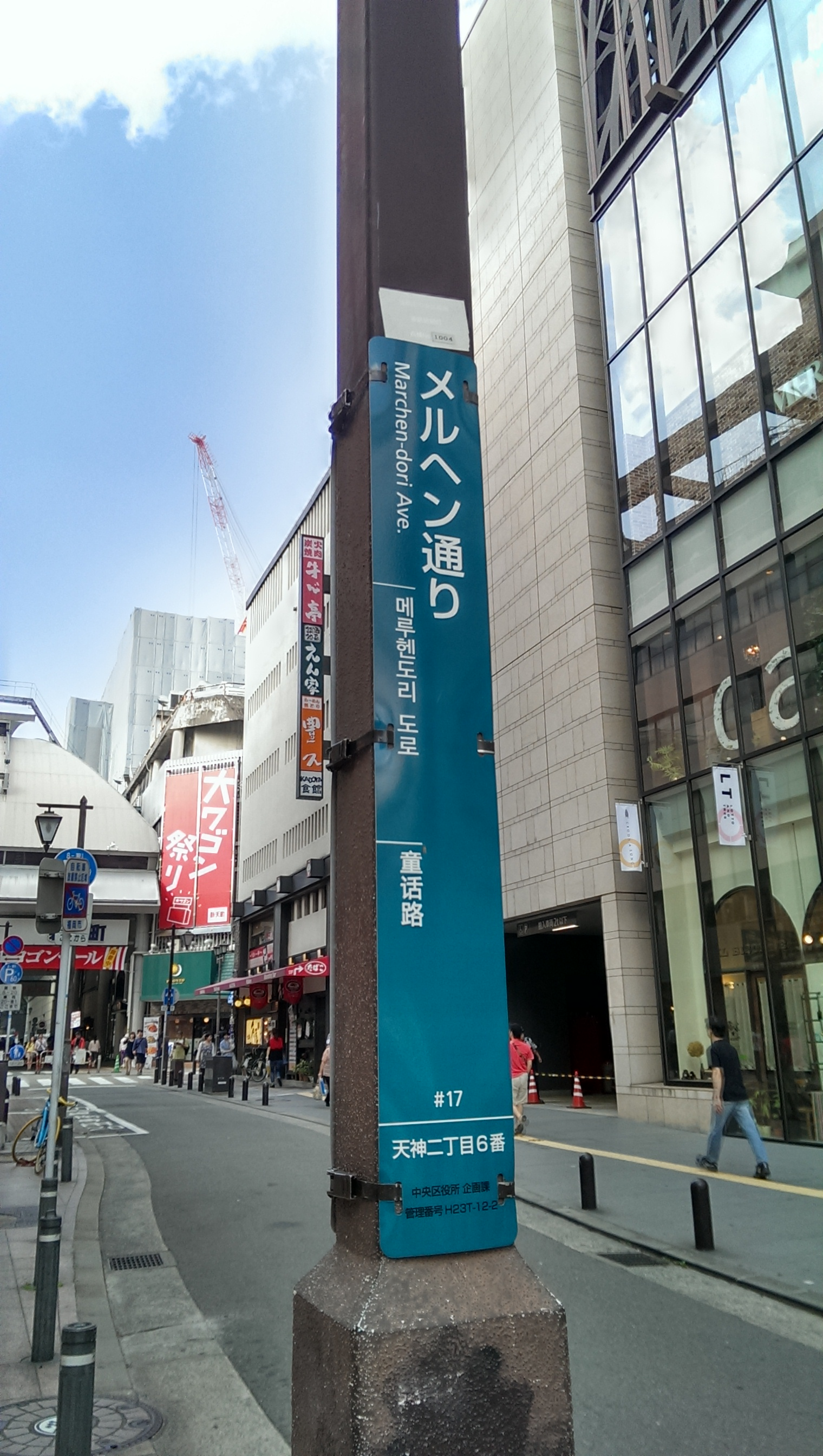 福岡市天神にある「メルヘン通り」